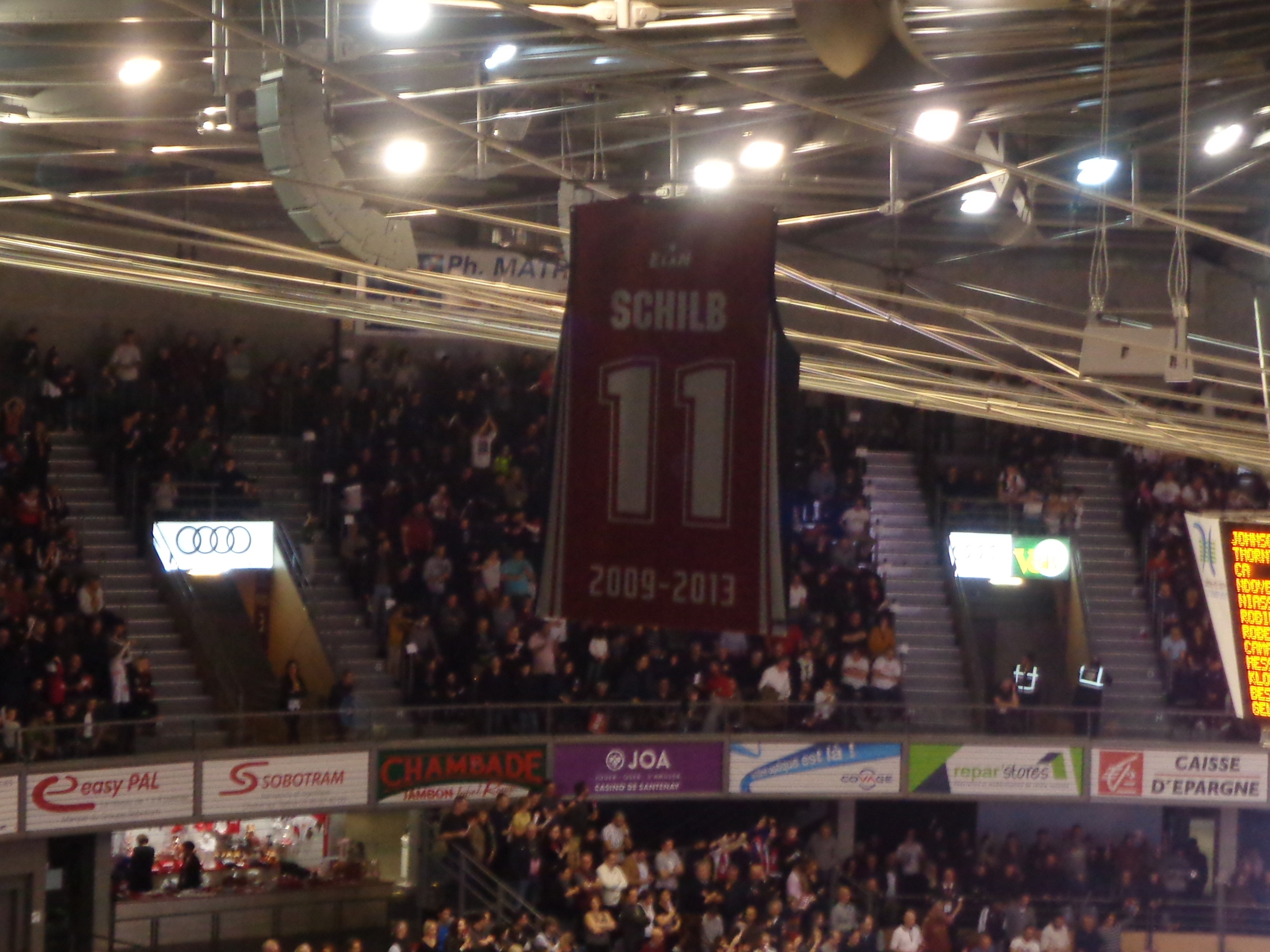 La bannière de Blake Schilb (maillot retiré) : Elan Chalon.